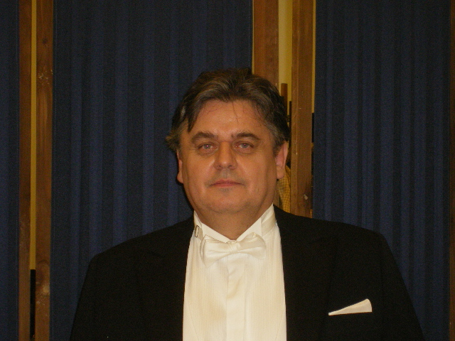 Memory kontserdil Estonias